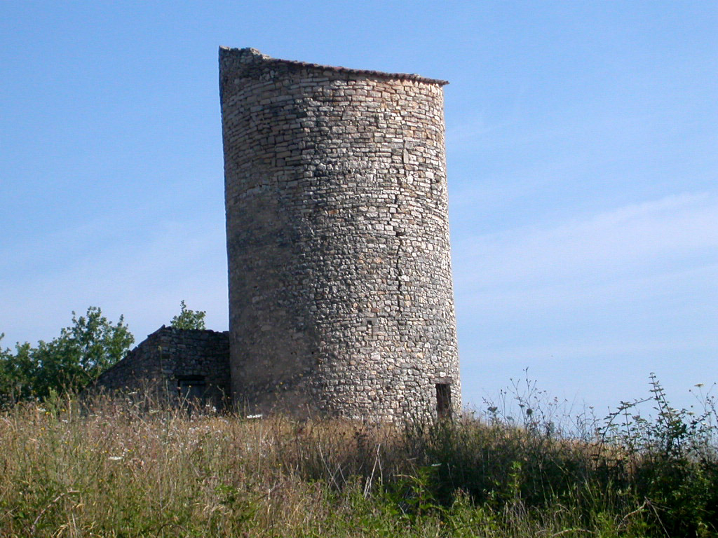 La tour d'Embarbe à Céreste, ancienne tour de guet reconvertie en pigeonnier